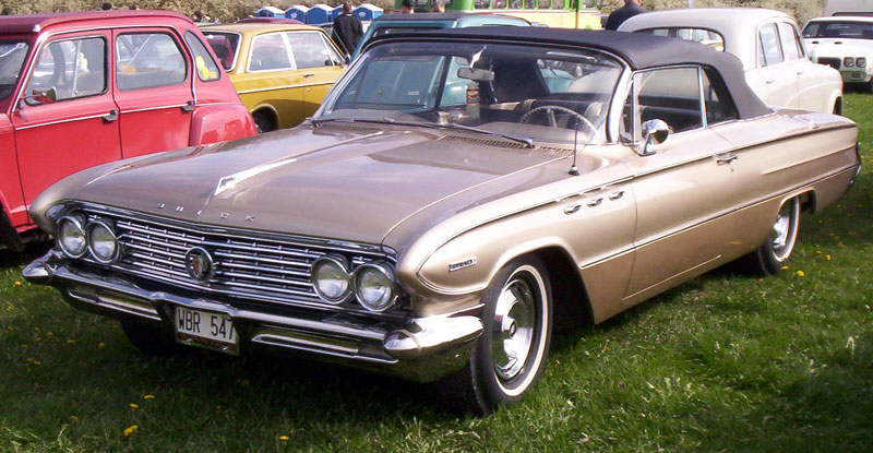 1961 Buick Invicta Series 4600 Model 4667 2-door Convertible